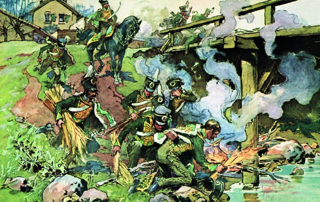 Николай Самокиш. 1812 год. Павлоградские гусары поджигают мост. Открытое письмо. Издательство: Ришар (Санкт-Петербург)